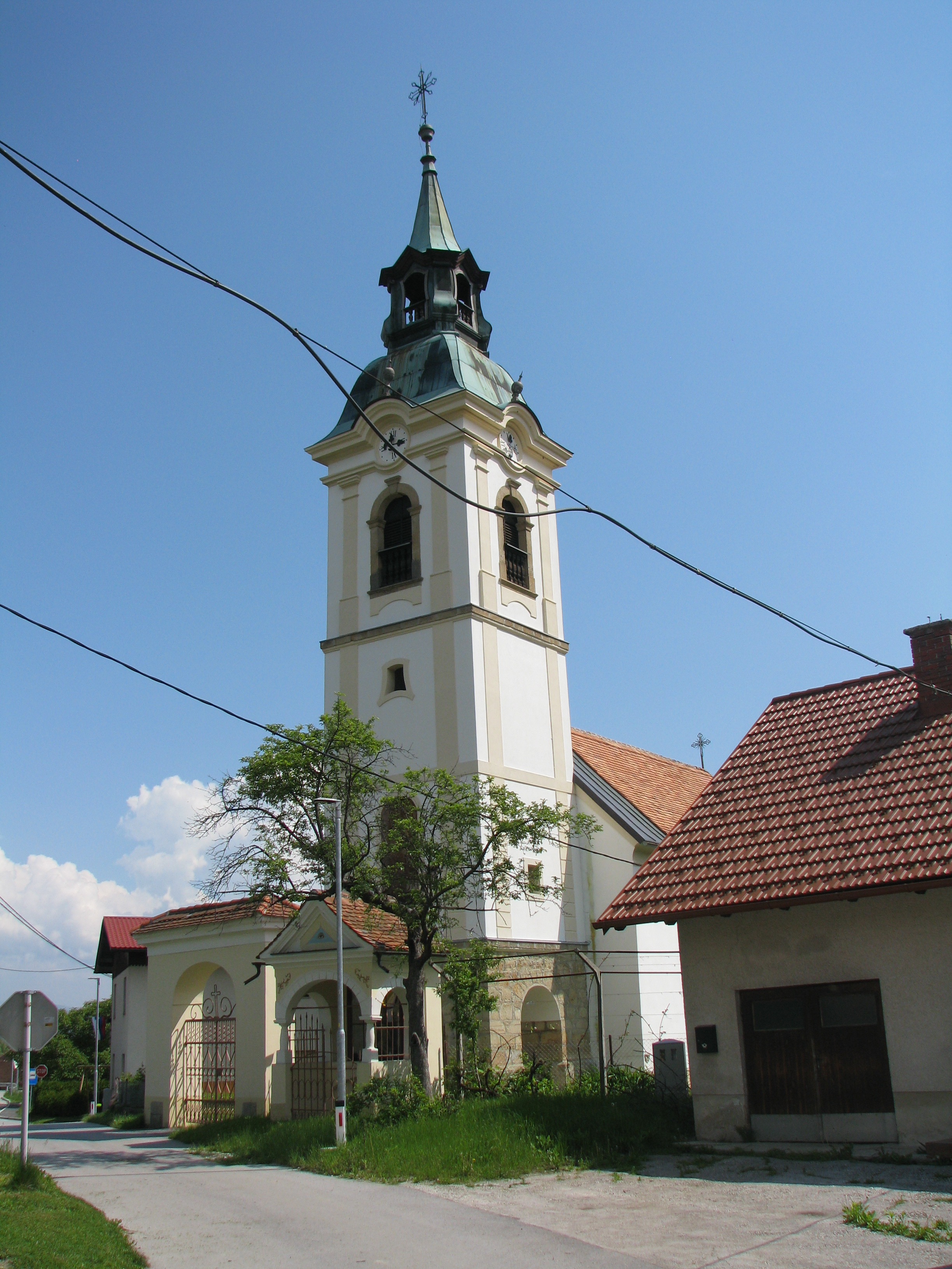 Cerkev svetega Lovrenca, Sveti Lovrenc